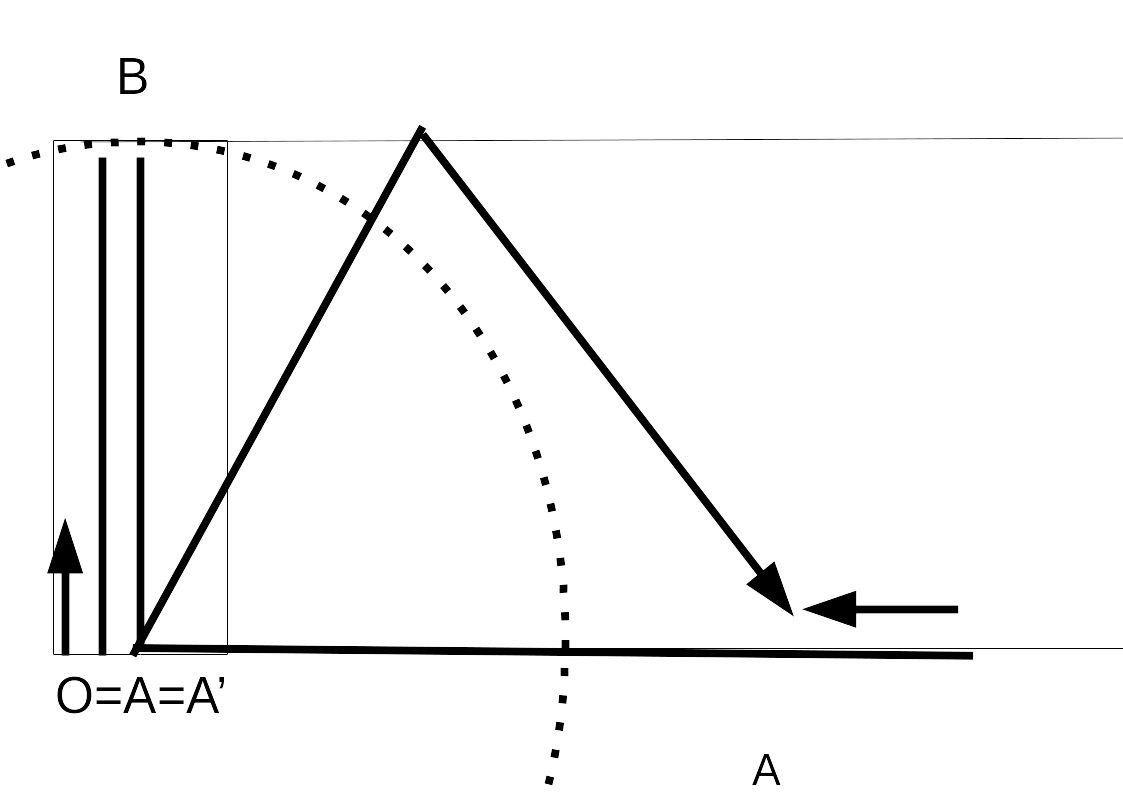 pendule à photon horizontale et verticale en mouvement à l'instant du retour au miroir A'